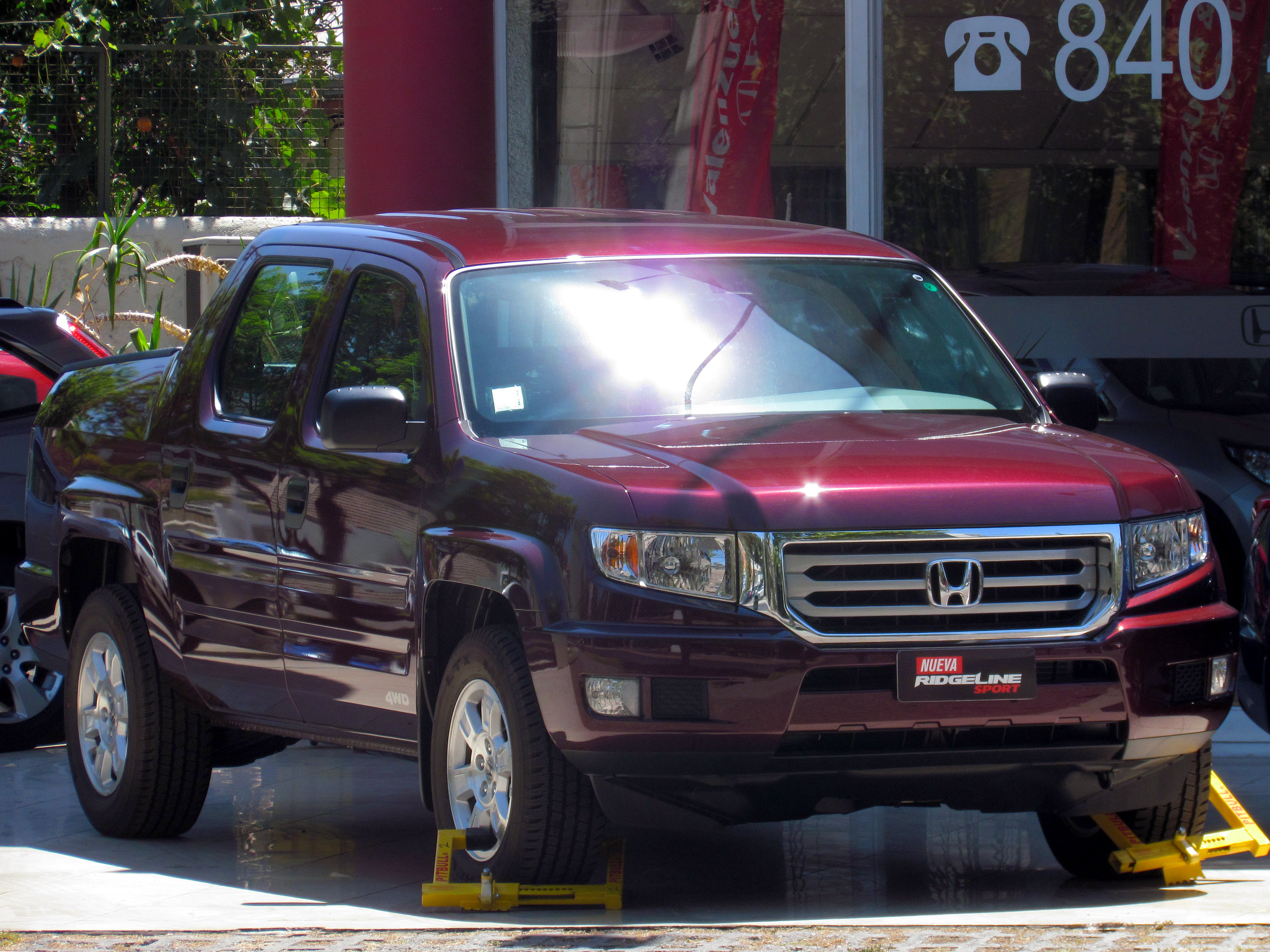 Honda Ridgeline RT 2014